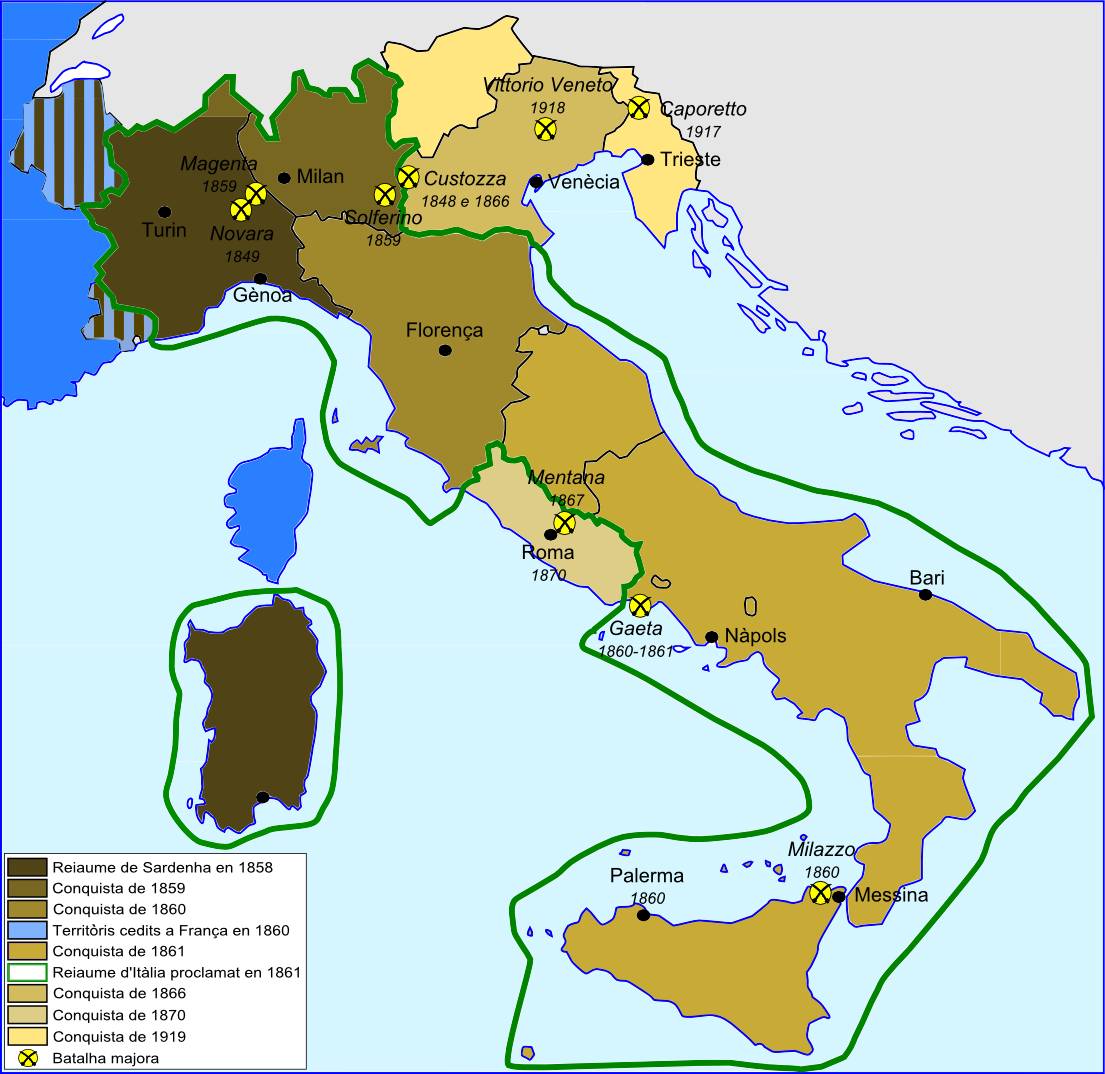 Formacion e expansion d'Itàlia entre 1859 e 1919.